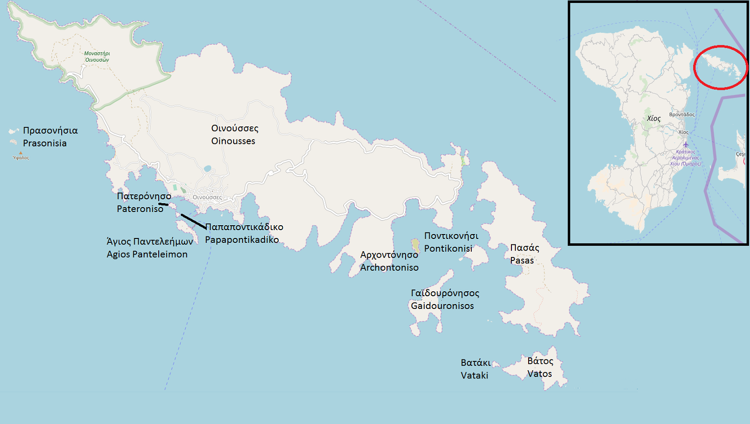 Οινούσσες